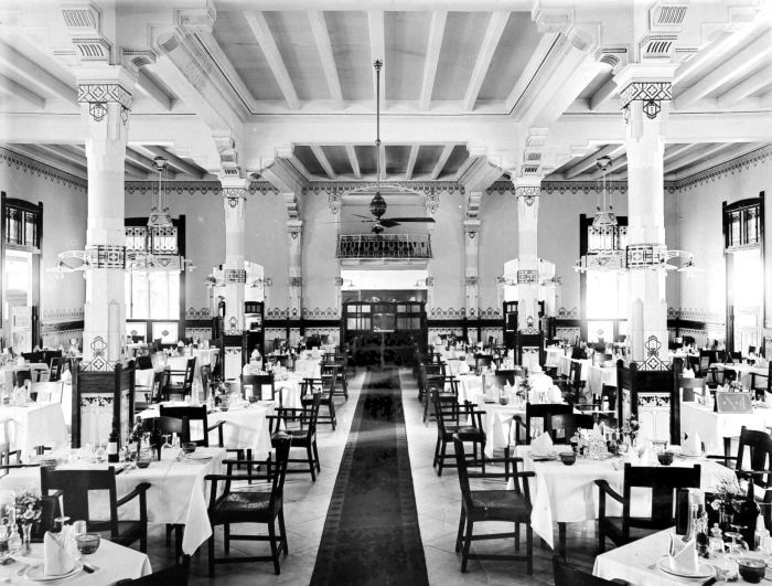 Negatief. De eetzaal in het hoofdgebouw van Hotel des Indes in Weltevreden, Batavia